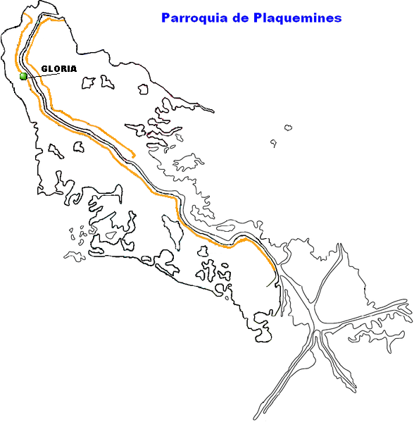 Gloria, Louisiana